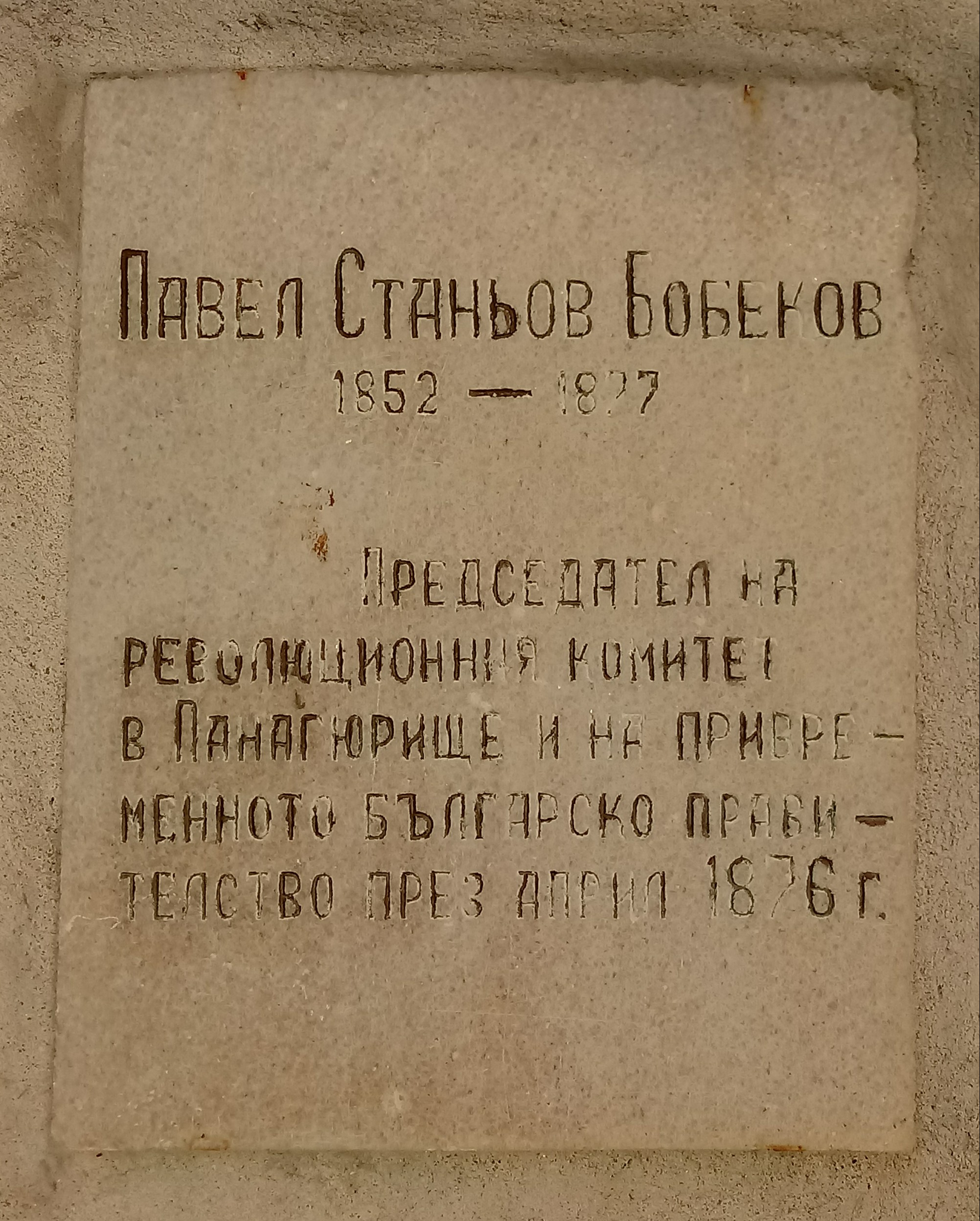 Pavel Bobekov memorial plaque, Panagyurishte